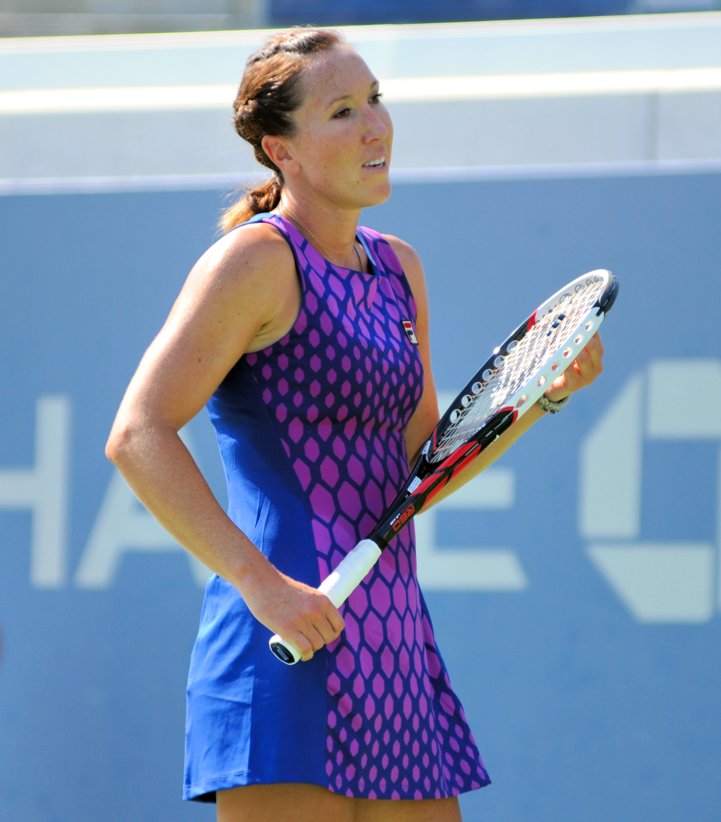 US Open 2014